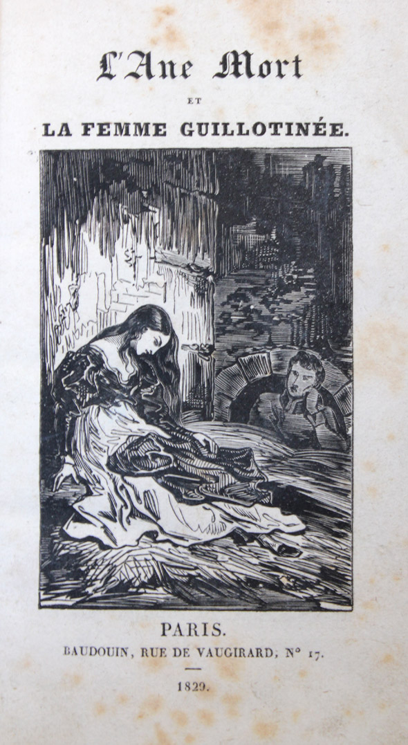 Janin, Clotilde de Lusignan (1822)